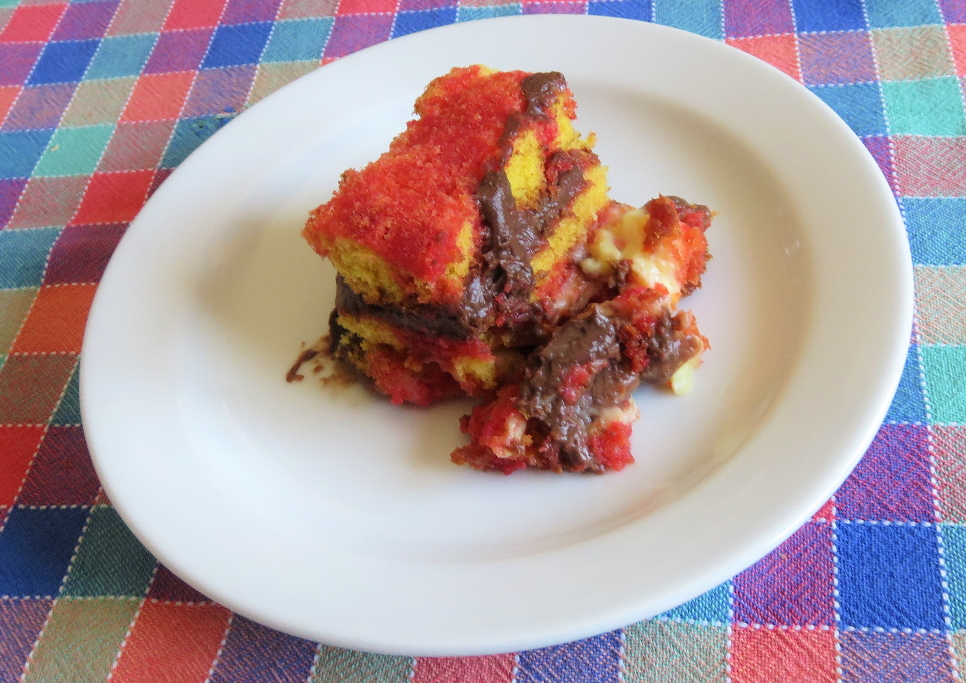 piccola porzione di zuppa inglese, dolce al cucchiaio italiano a base di pan di Spagna, crema e liquore